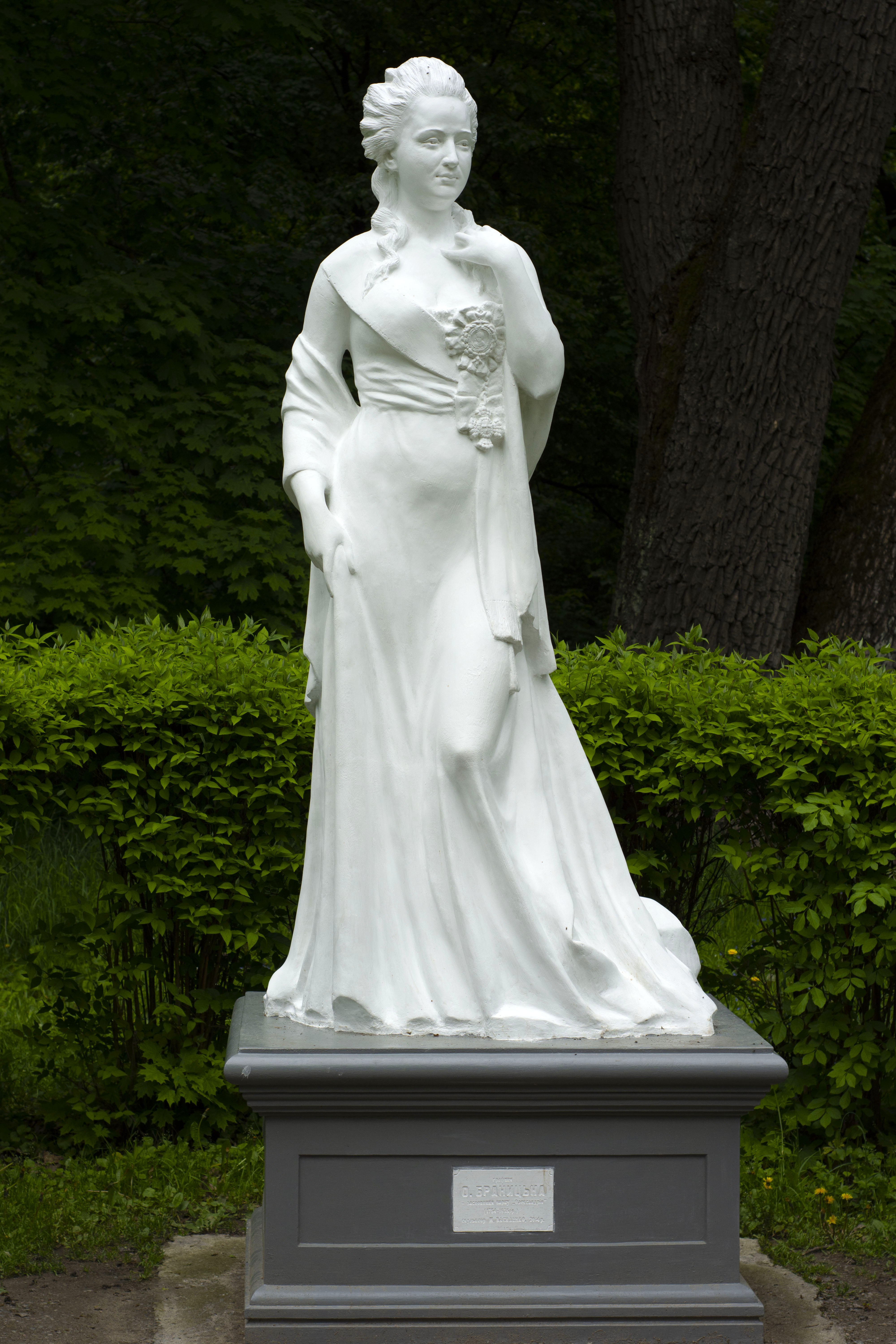 «Олександрія», Білоцерківський район, Білоцерківська міська рада, Фурсівська та Пилипчанська сільські ради